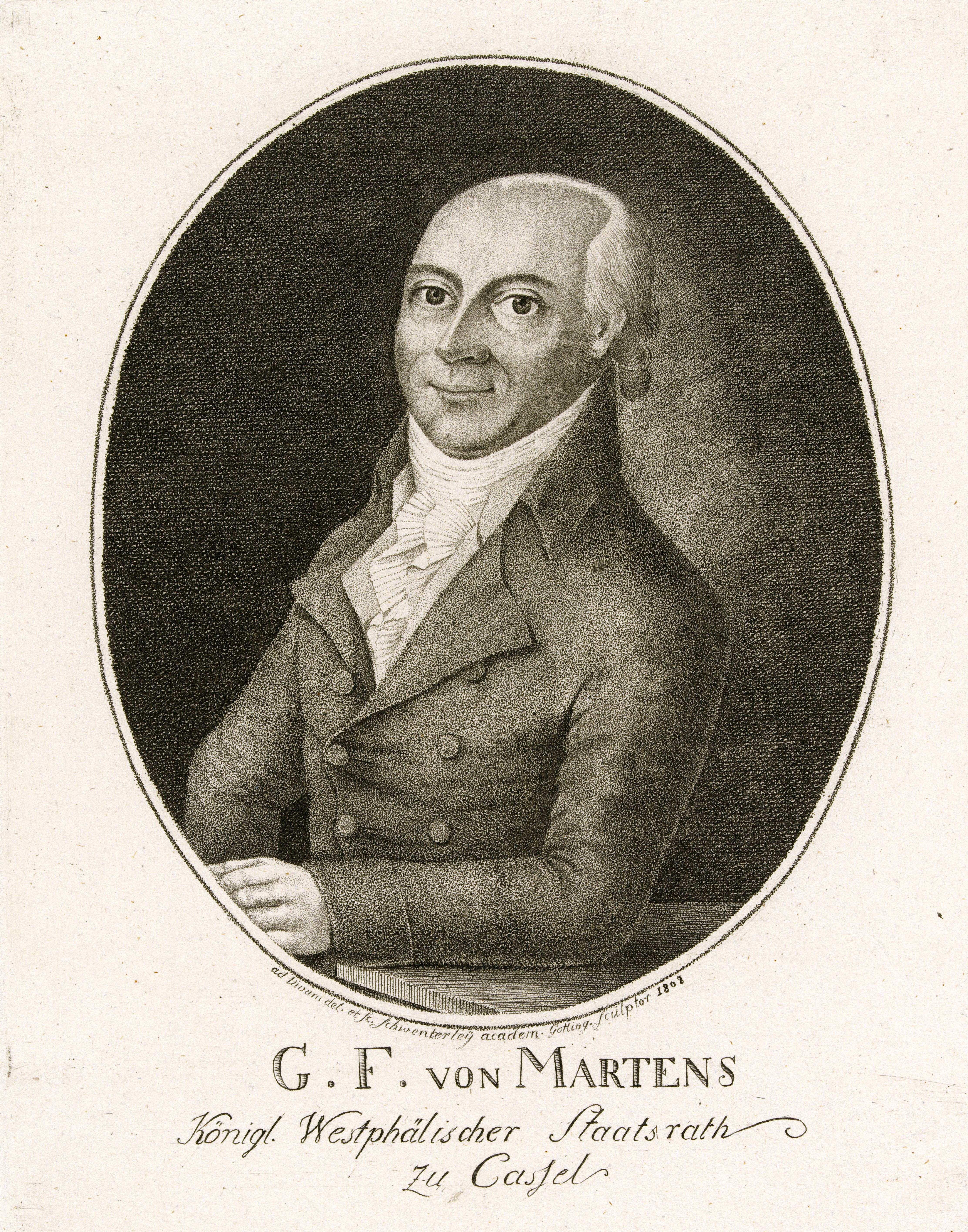 G. F. von Martens